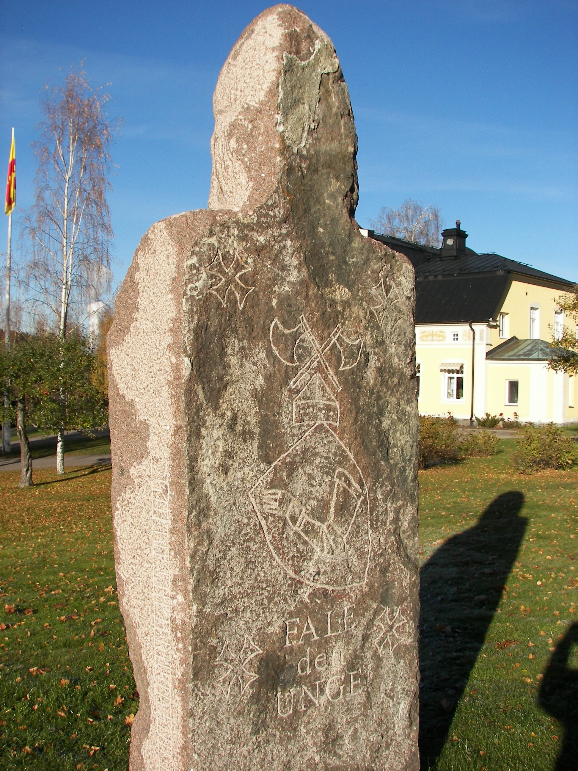 Skulpturen Fale Bure av Lars Widenfalk vid Sköns kyrka.